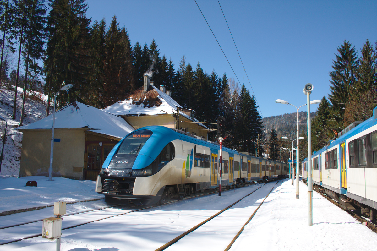 Elektryczny zespół trakcyjny 27WEb-001 w malowaniu przewoźnika Koleje Śląskie wjeżdża na stację kolejową Wisła Głębce.